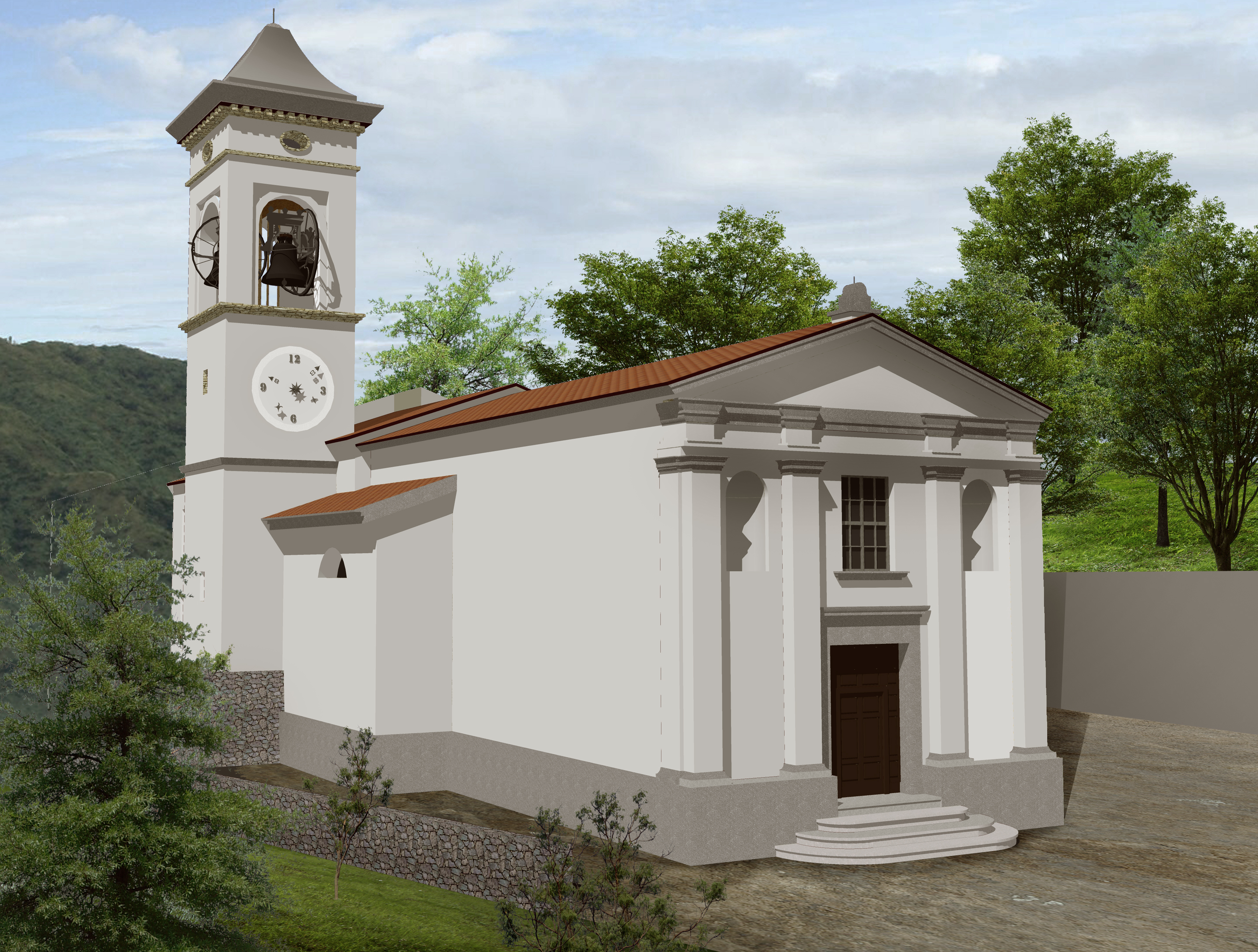 Ricostruzione grafica della chiesa prima dell'ampliamento del 1880 effettuato sulla base dei rilievi e dei documenti storici